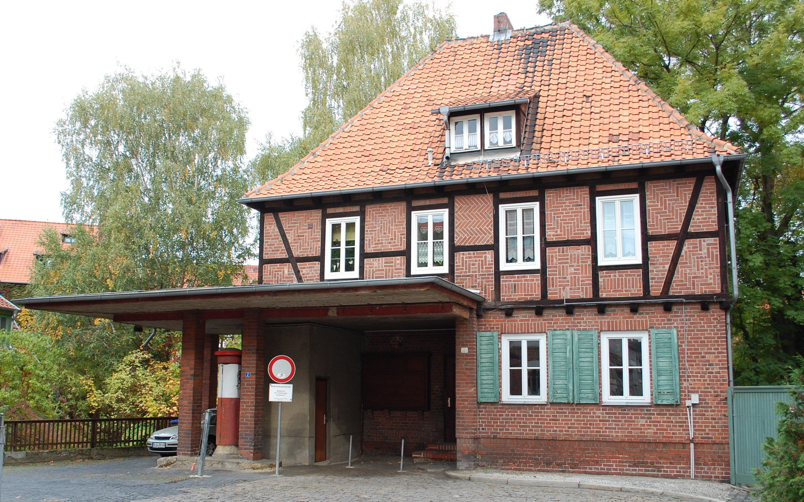 Haus Am Hospital 2 in Quedlinburg, ehemalige Tankstelle